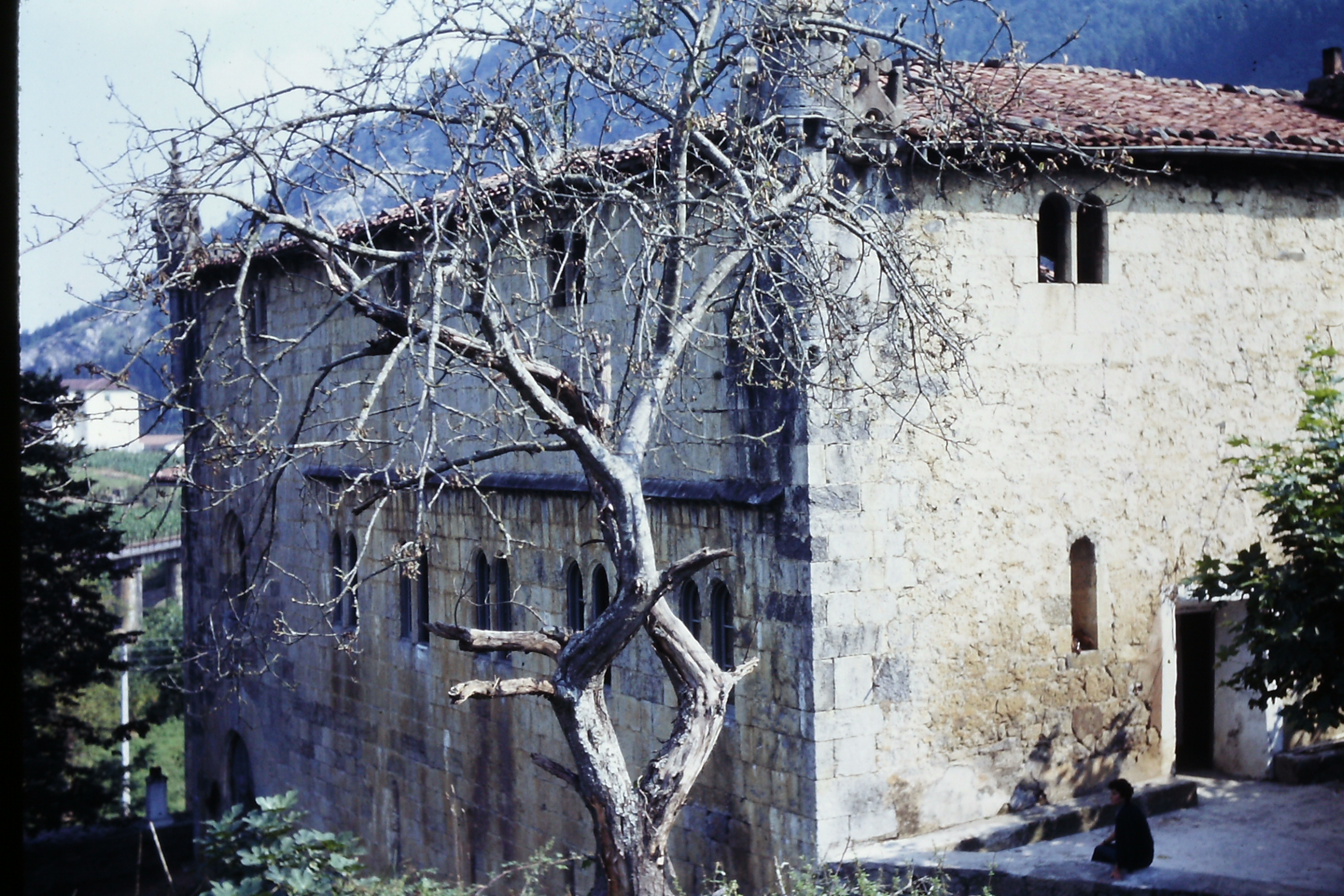 Lili jauregia, Zestoa